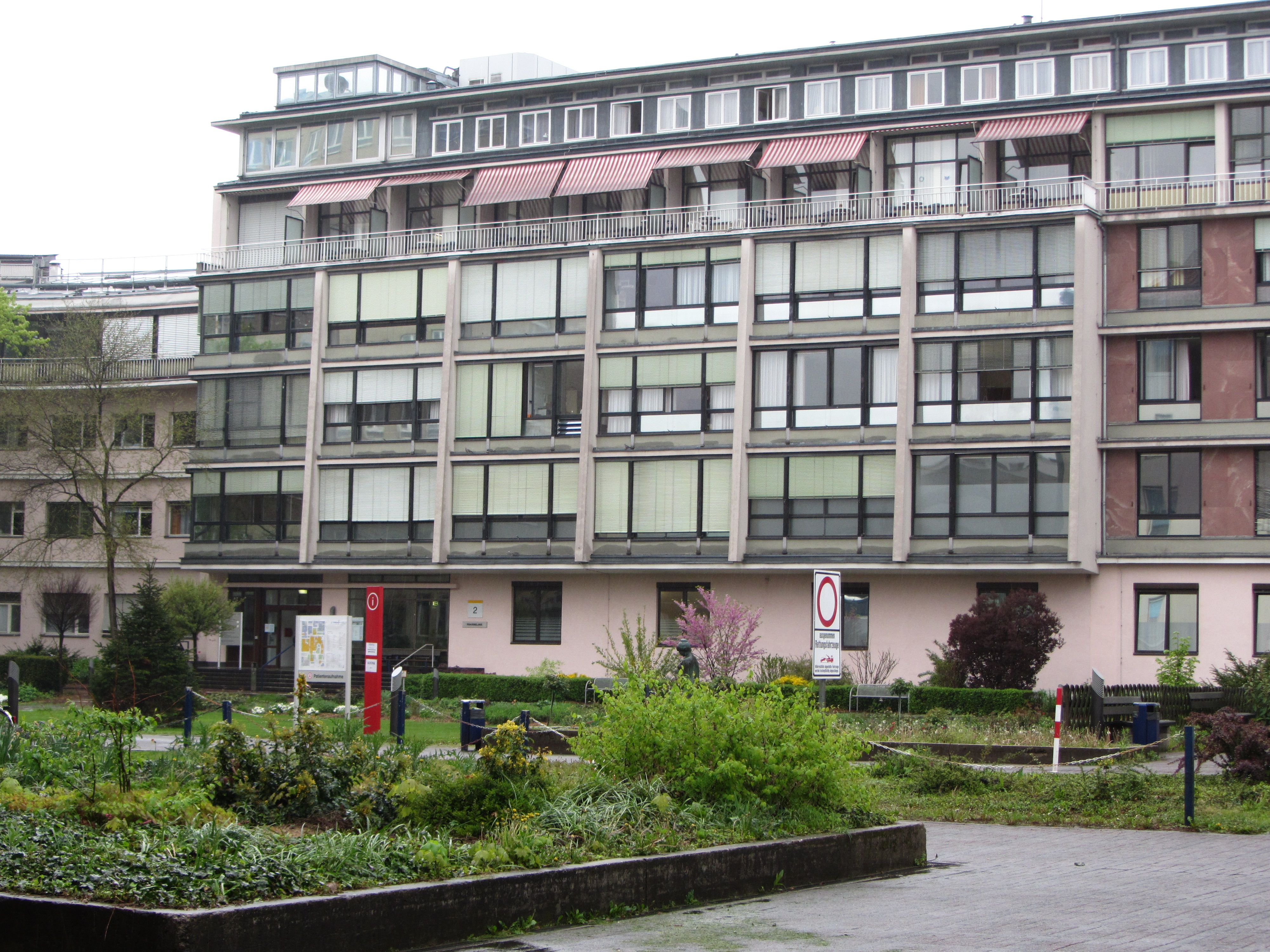 Klinikum Darmstadt: Teil des Gebäudekomplexes